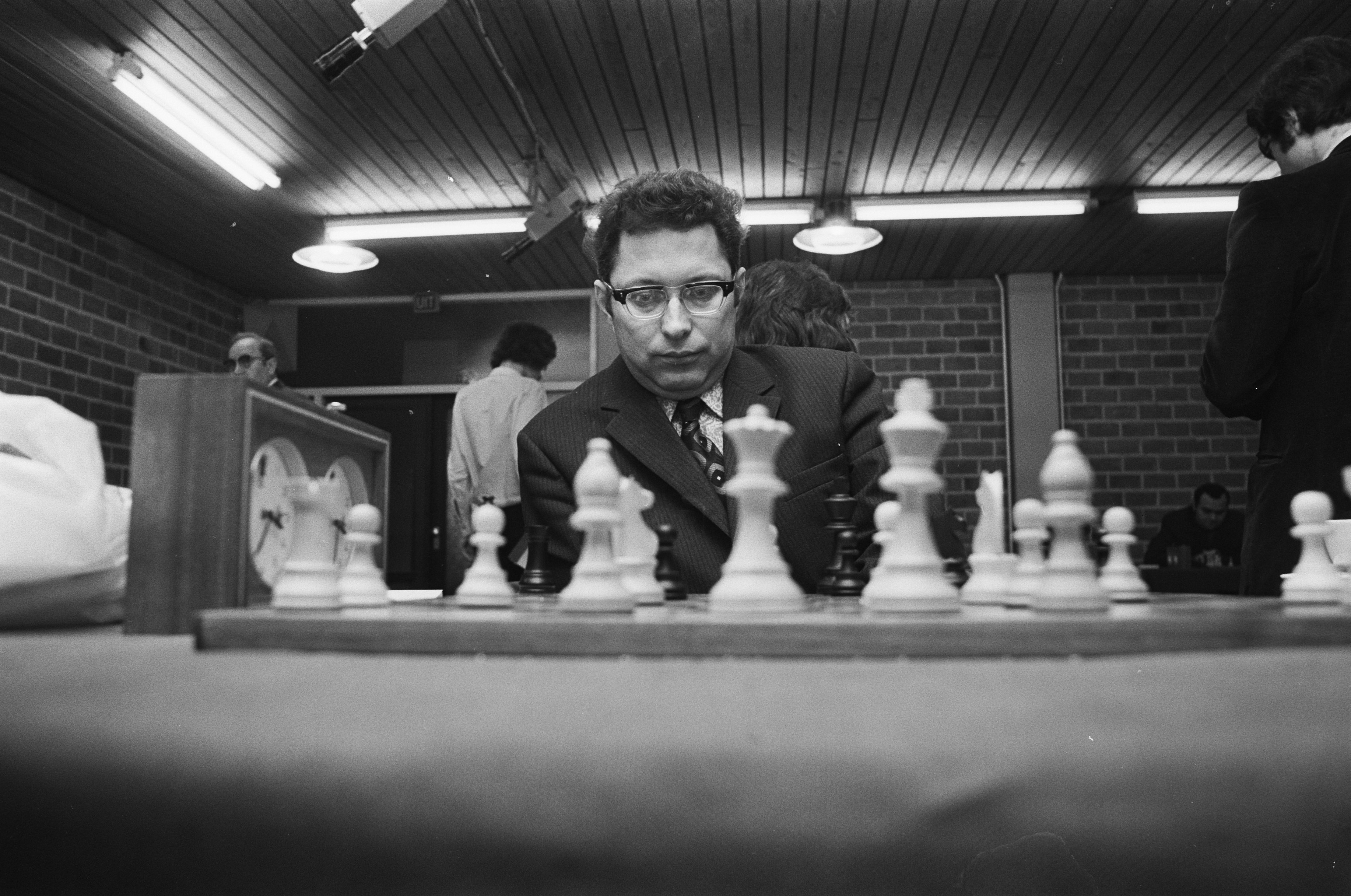 Collectie / Archief : Fotocollectie Anefo Reportage / Serie : [ onbekend ] Beschrijving : Hoogoven-schaaktoernooi te Wijk aan Zee , de Rus Wasjoehof Datum : 23 januari 1973 Locatie : Noord-Holland, Wijk aan Zee Trefwoorden : schaken Instellingsnaam : Hoogovenschaaktoernooi Fotograaf : Verhoeff, Bert / Anefo Auteursrechthebbende : Nationaal Archief Materiaalsoort : Negatief (zwart/wit) Nummer archiefinventaris : bekijk toegang 2.24.01.05 Bestanddeelnummer : 926-1745